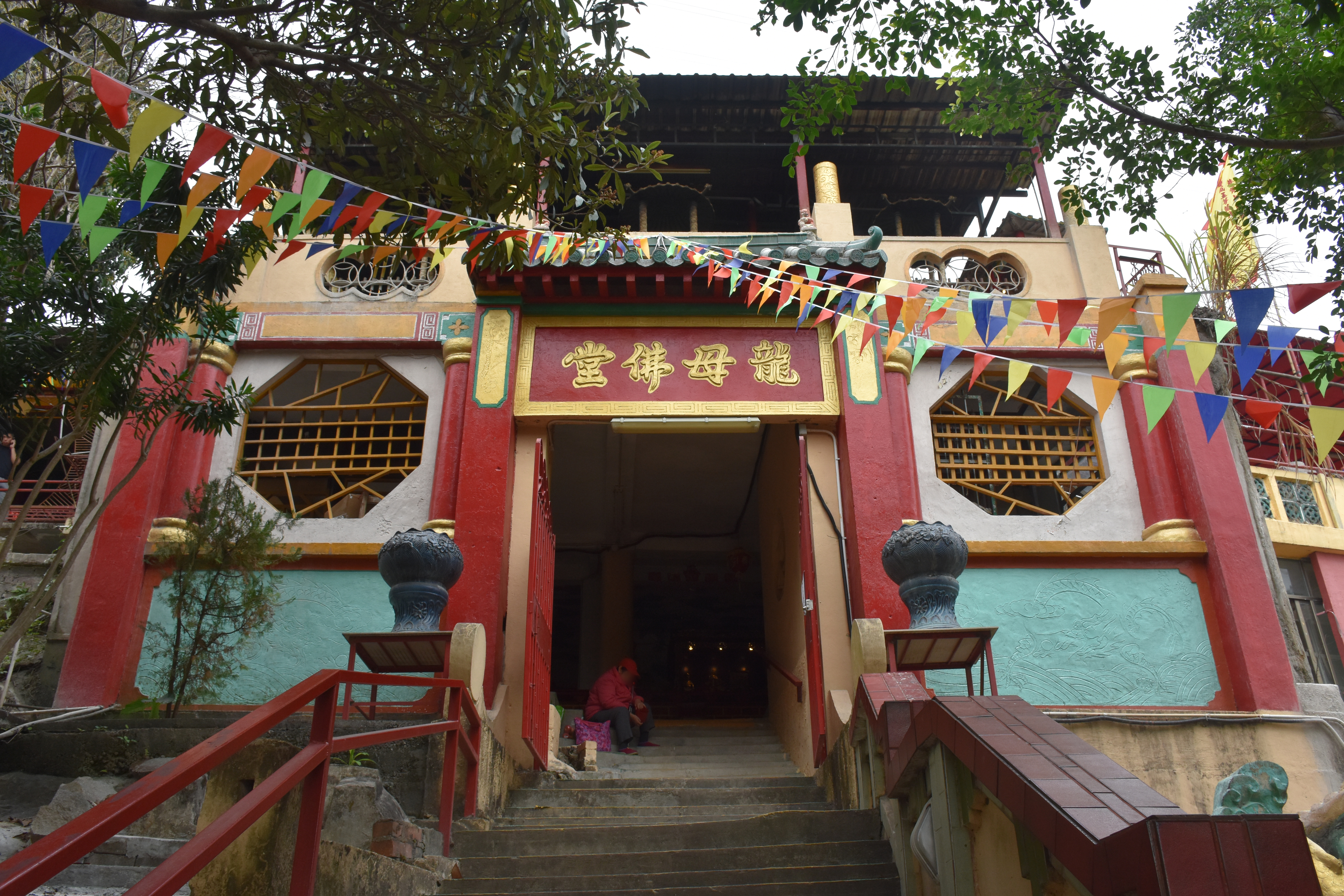 中文（香港）: 上角山龍母佛堂